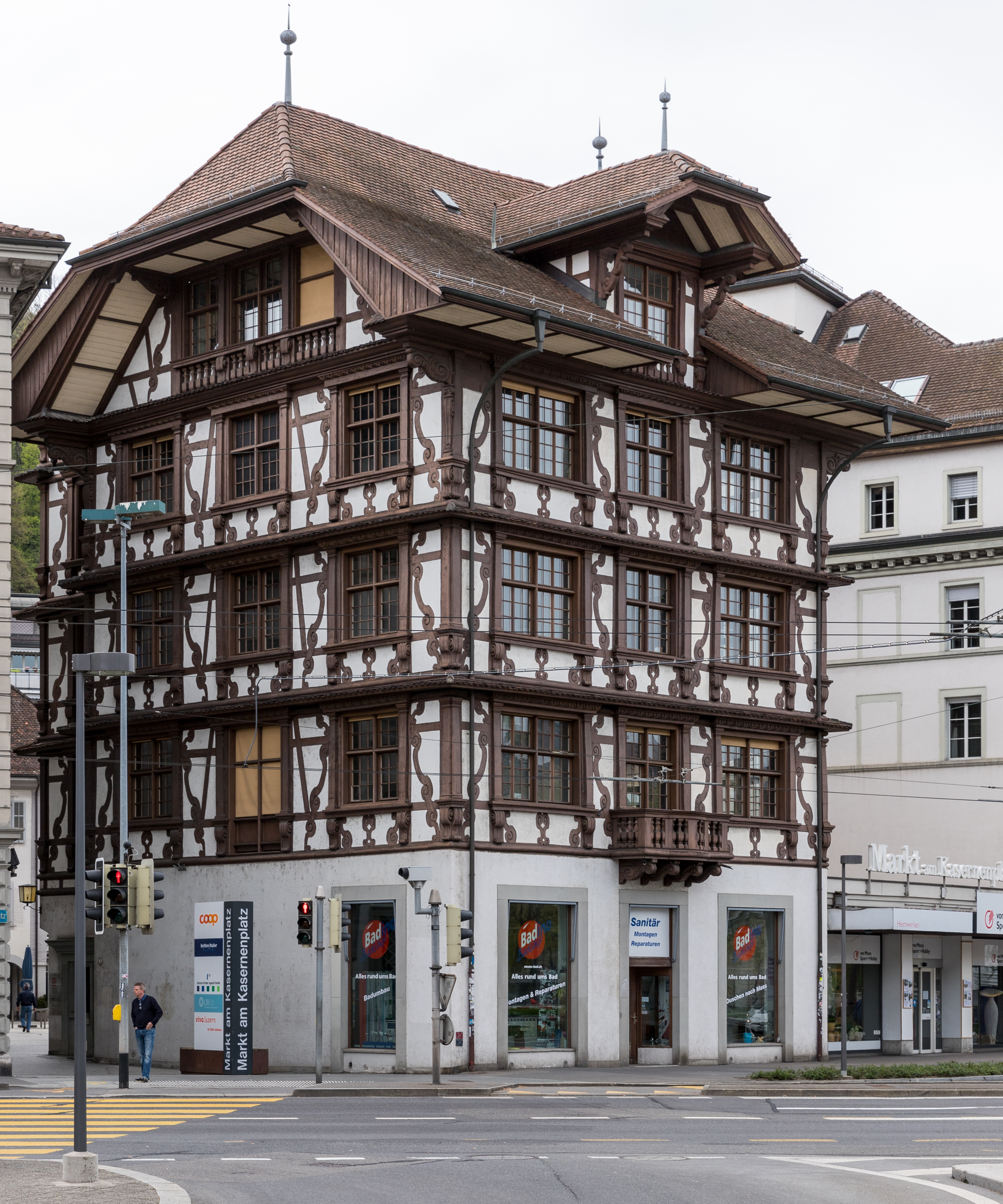 Anderallmend-Haus (von Moos-Haus)